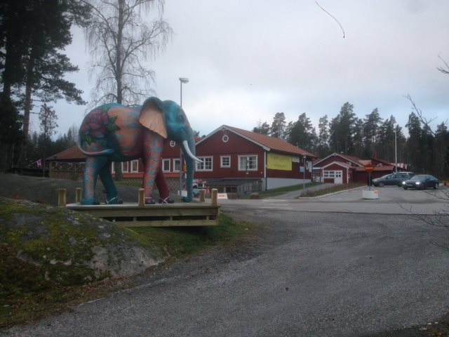 Graffitimålade elefanten Ljumbo vid Ljusterö Torg, ägd av Ljusterö konstförening, och tidigare av elefantskötaren Dan Koehl